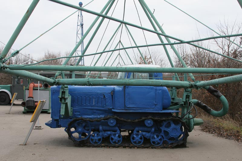 Дождевальна машина ДДА-100 МА на базе трактора ДТ-75 в Саратове на Соколовой горе